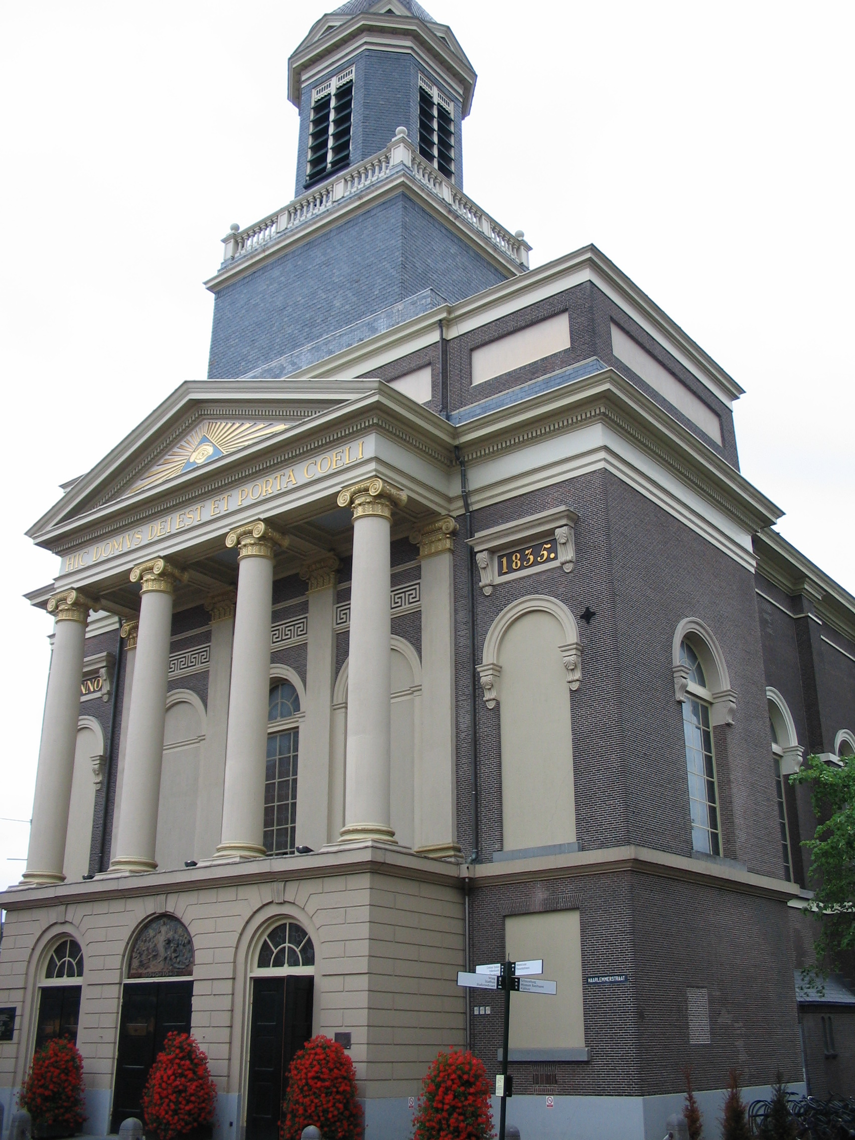 Hartebrugkerk, Leyde/Leiden (Pays-Bas).